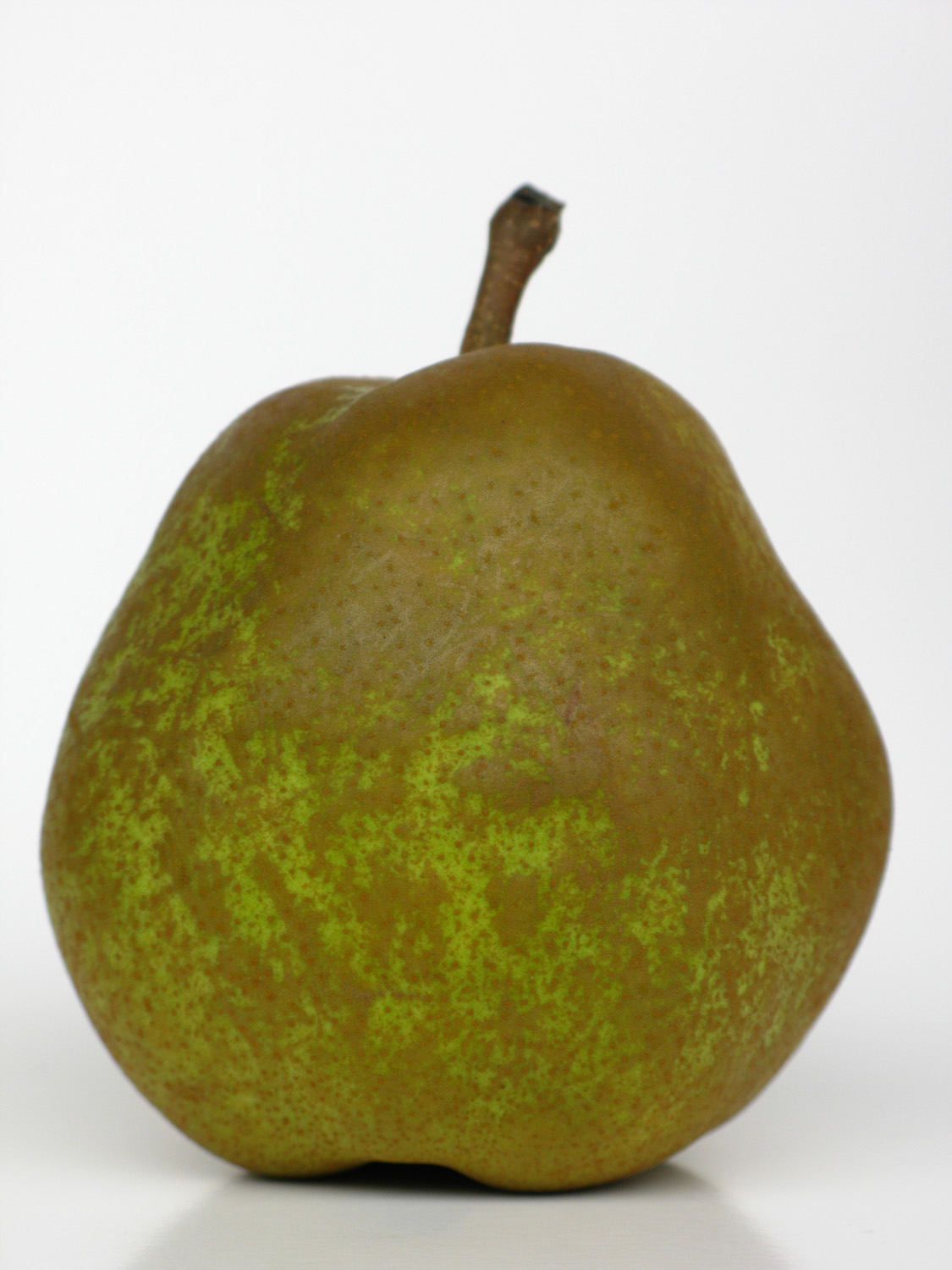 Pear, "La France" (Claude Blanchet) 「ラフランス」